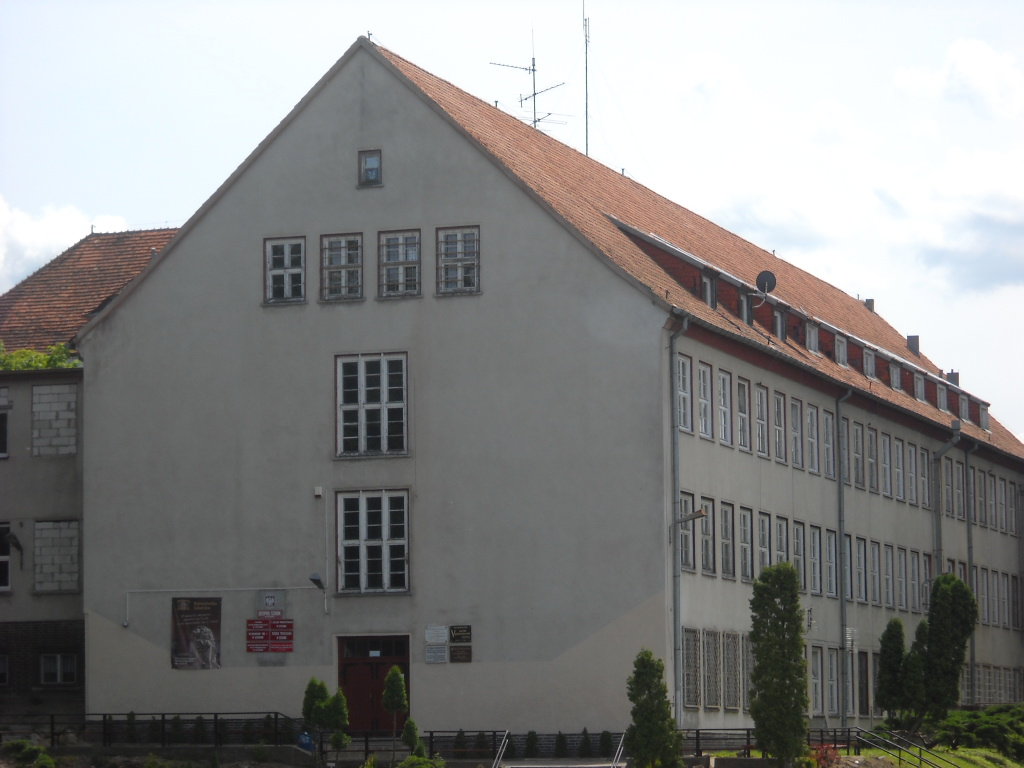 Budynek Zespołu Szkół w Sztumie, ul. Kasprowicza 3